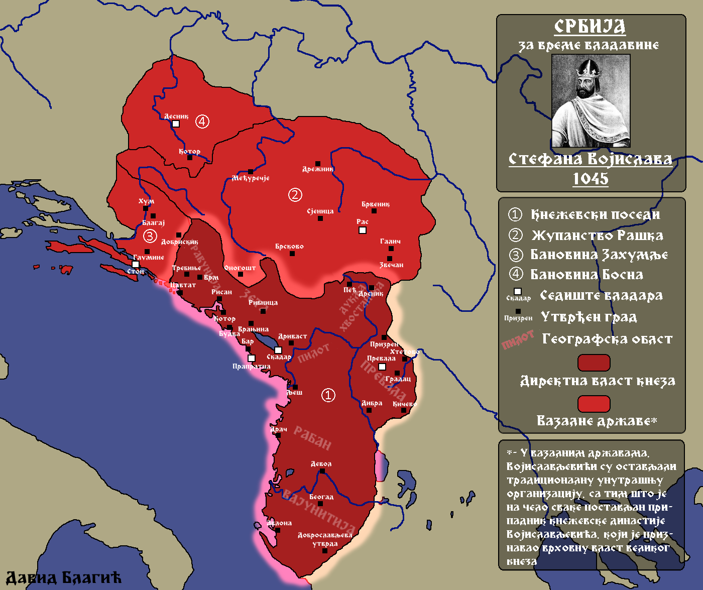 Српски (ћирилица): Историјска карта која приказује границе српских земаља за време владавине кнеза Стефана Војислава, 1045. године. Извори: 1. Мавро Орбини, "Краљевство Словена", Ганеша Клуб, 2016, Београд, стр. 303-306 2. John Van Antwerp Jr. Fine, "The Early Medieval Balkans: A Critical Survey from the Sixth to the Late Twelfth Century", Ann Arbor, Michigan: University of Michigan Press, 1991, стр. 223 3. Тибор Живковић, "Портрети српских владара (IX-XII век)", Завод за уџбенике и наставна средства, Београд, 2006, стр. 131. 4. Реља Новаковић, "Где се налазила Србија од VII до XII века", Народна књига и Историјски институт, Београд, 1981. 5. Станоје Станојевић, „Историја српскога народа“, Београд. 1926. 6. Др. Борислав Влајић "Срби староседеоци Балкана и Паноније", Стручна Књига, Београд, 1999 7. Милош Благојевић et al. "Историјски атлас", Завод за уџбенике и наставна средства и Предузеће за картографију "Геокарта", Београд, 2005, стр. 35, 36, 40 8. Gyula Moravcsik, "Constantine Porphyrogenitus: De Administrando Imperio" (2. изд.). Washington: Dumbarton Oaks Center for Byzantine Studies, 1967 9. Милош С. Милојевић, "Одломци историје Срба и српских - југословенских земаља у Турској и Аустрији", Етхос, Беогад, 2004.